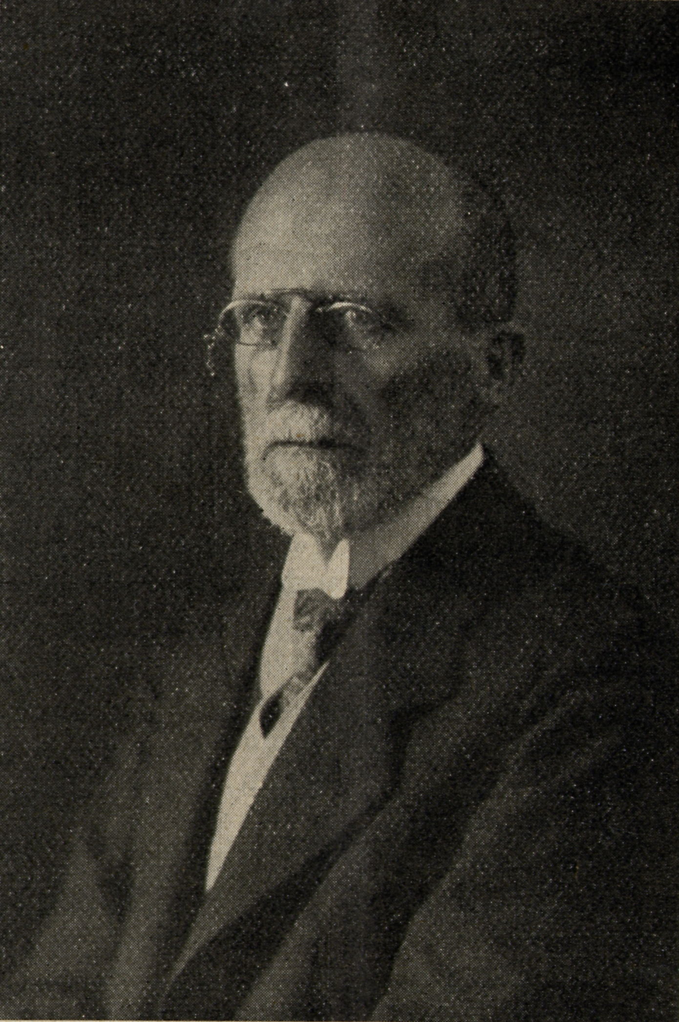 Porträtfotografie von Herman Haupt (1854-1935)